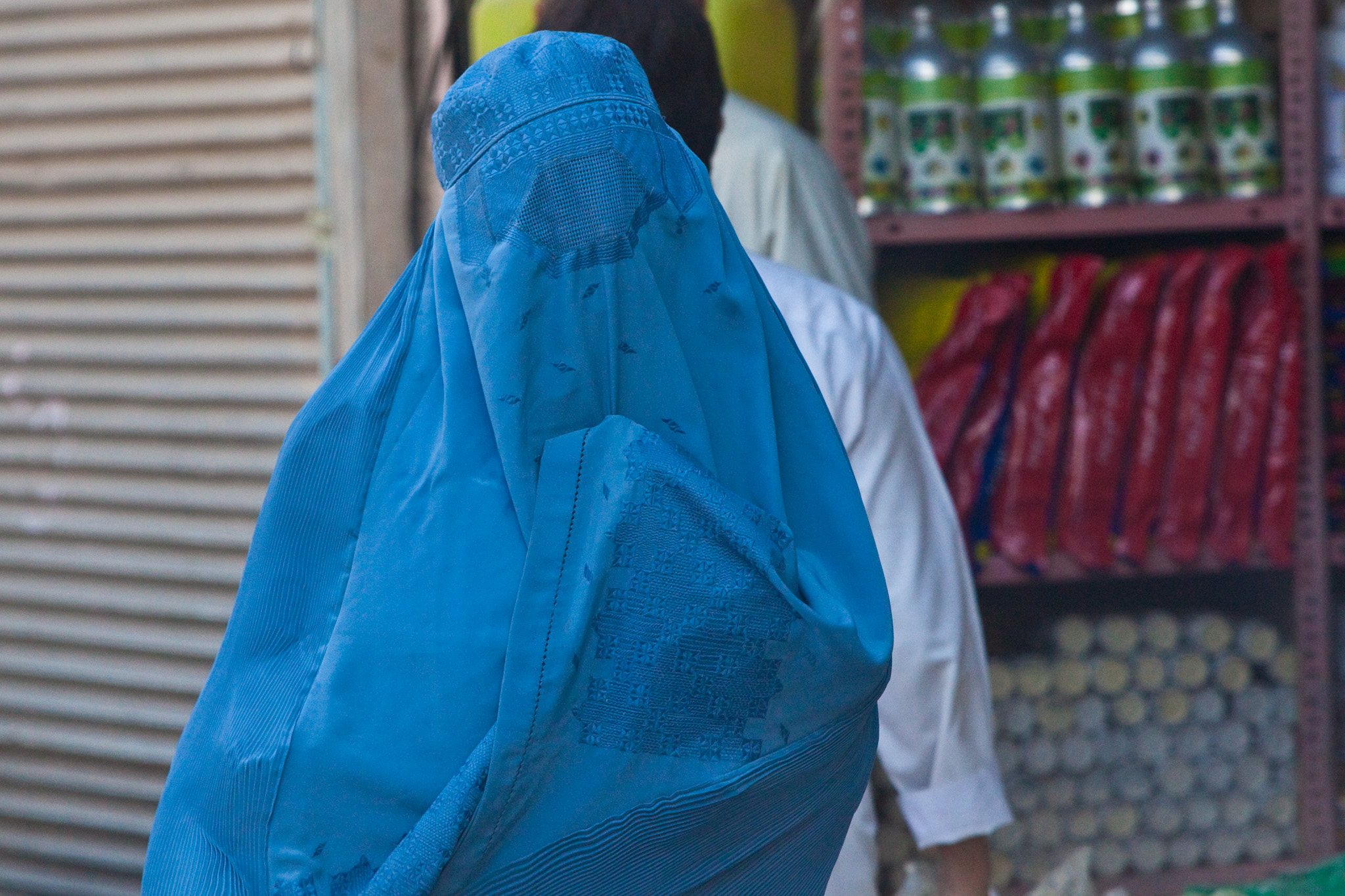 Herat Afghanistan